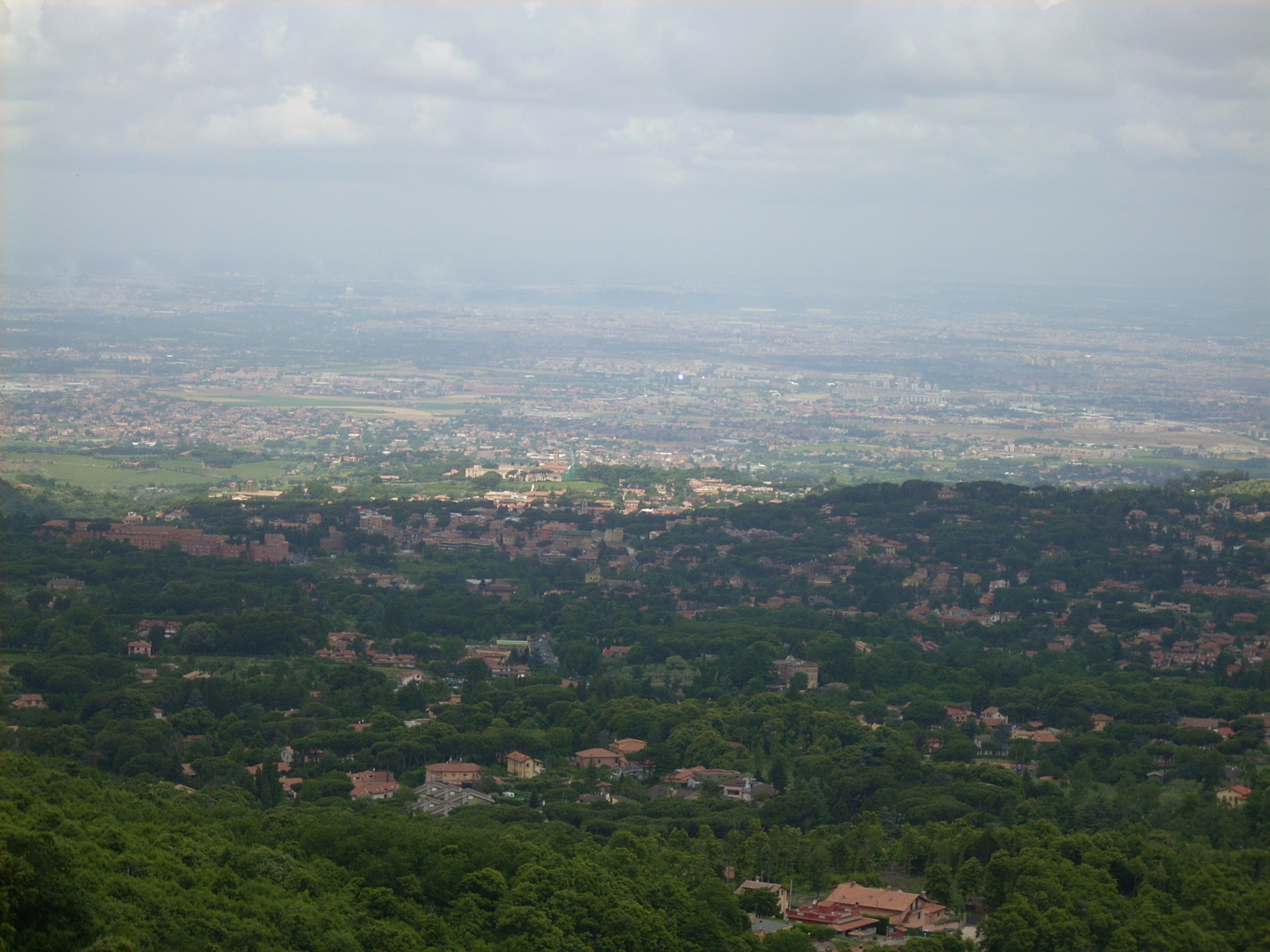 Panorama da Rocca di Papa verso Roma